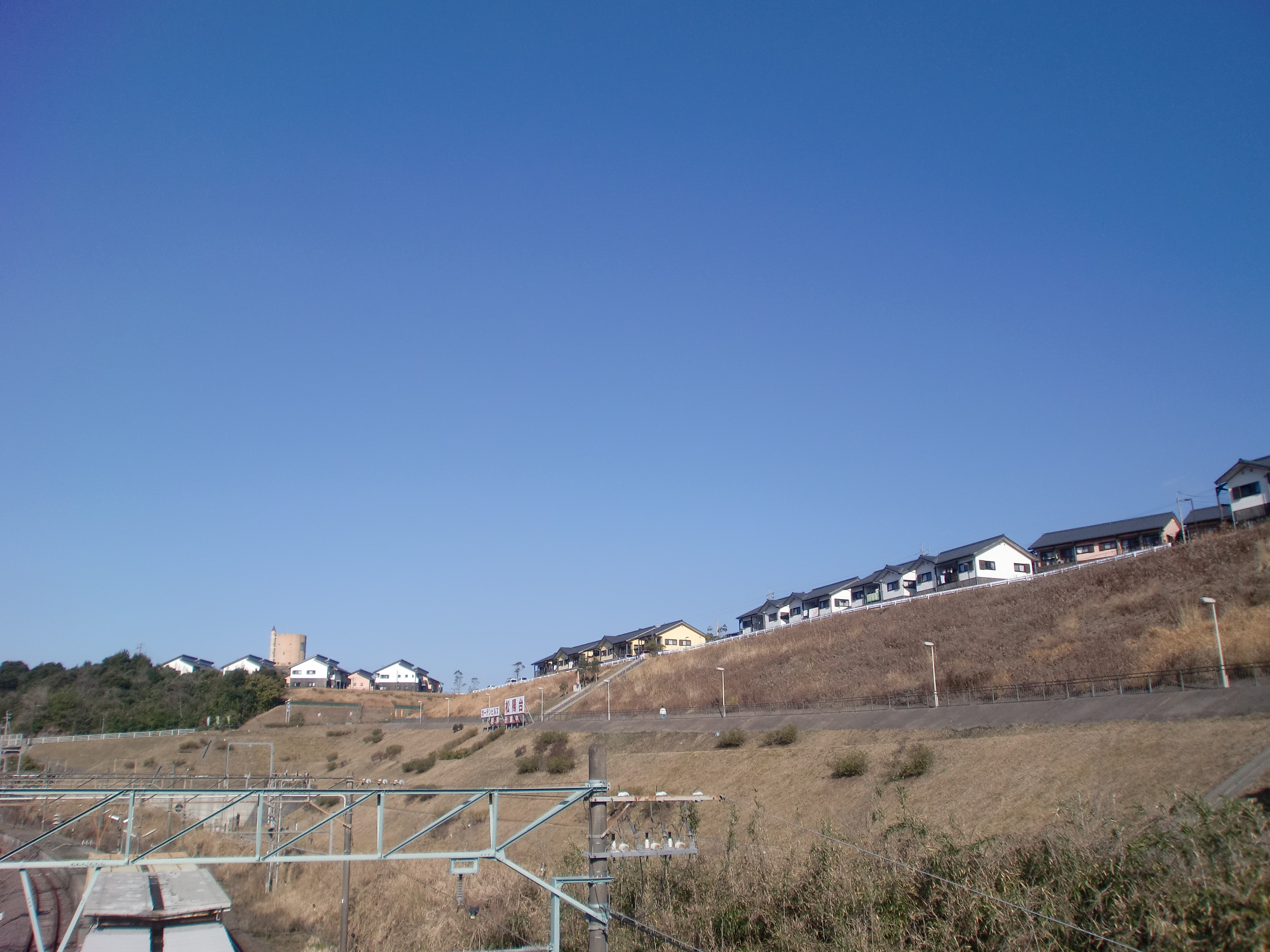 鹿児島市松陽台町を上伊集院駅の跨線橋から望む。